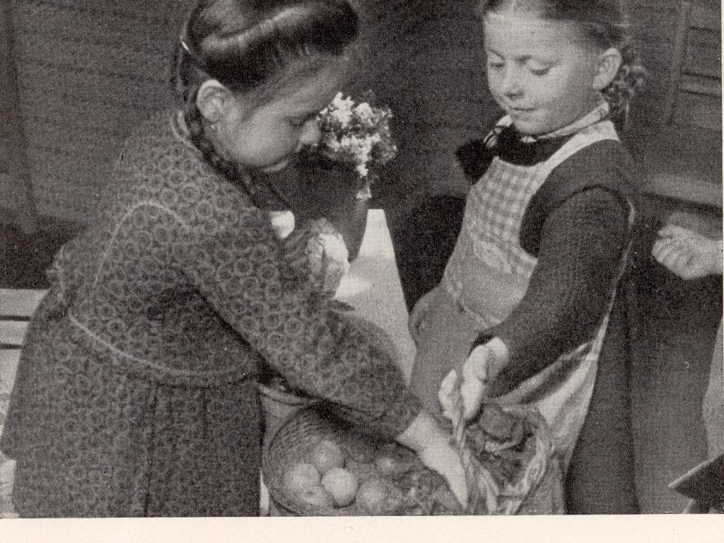 Raumteiler Kaufladen